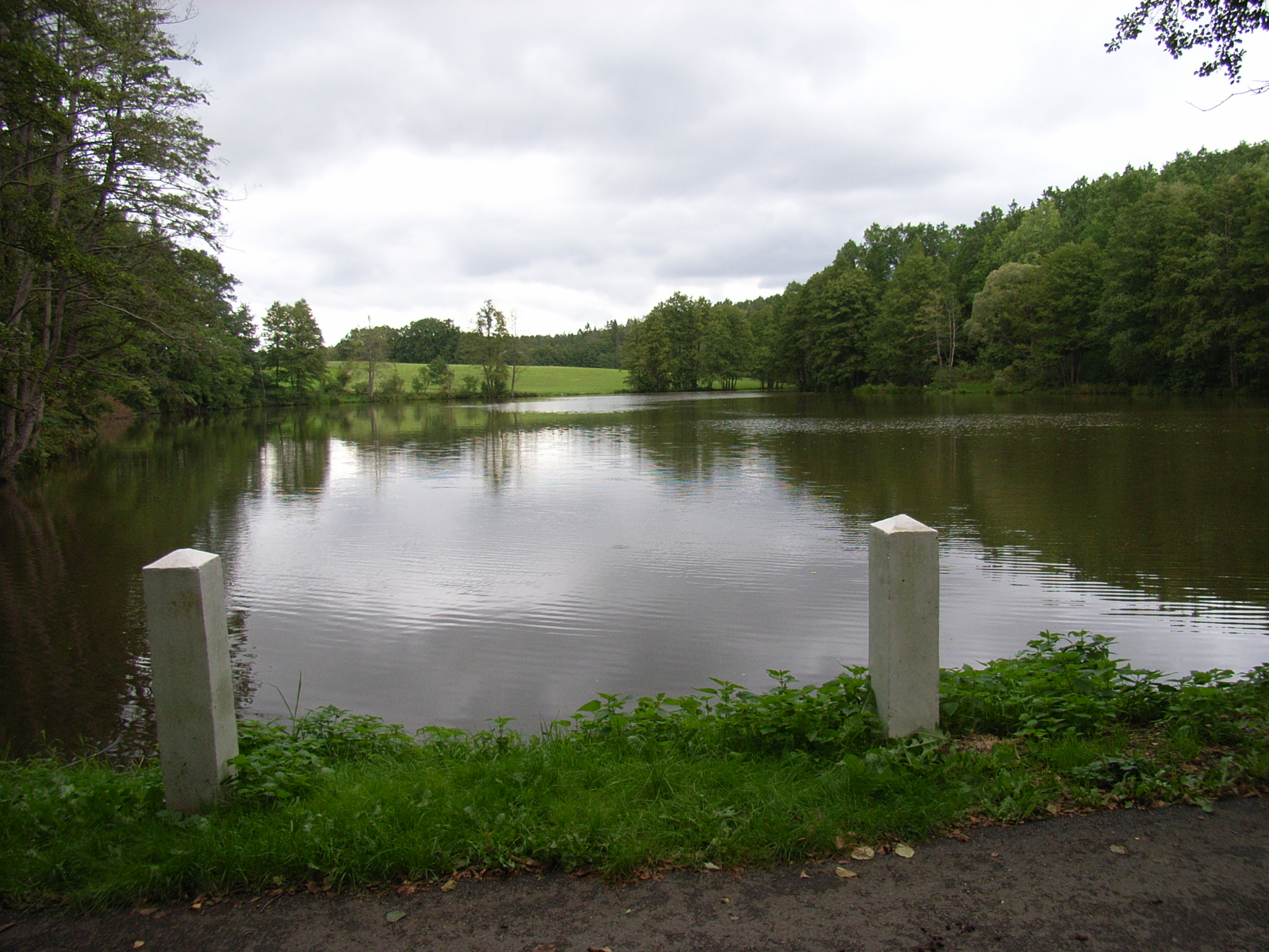 Usazovací nádrž Malý Jordán